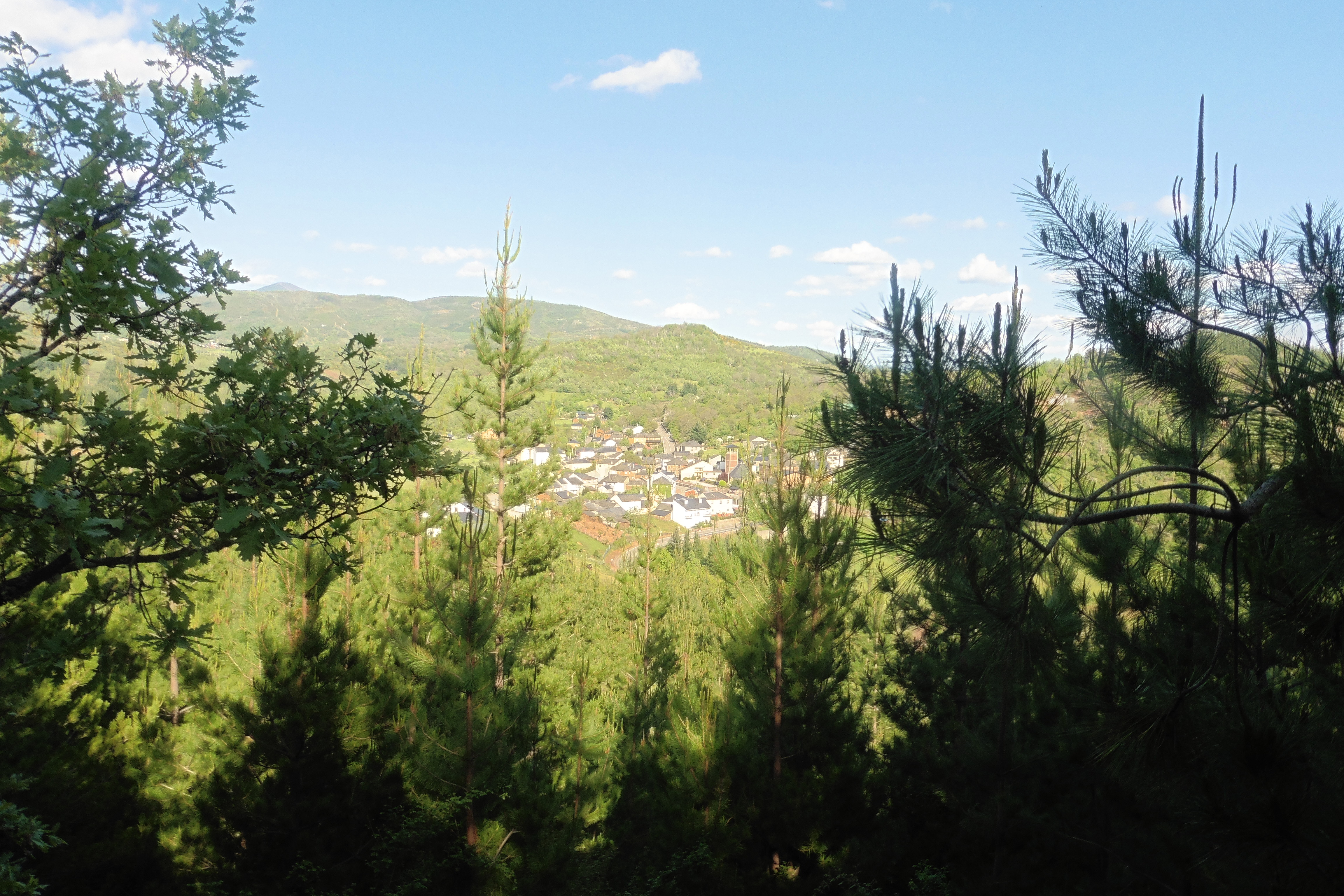 Panorámica de Berlanga del Bierzo, un soleado día de mayo. E pueblo se divisa entre frondosa vegetación y en frente, Abruello, poblado de castaños.